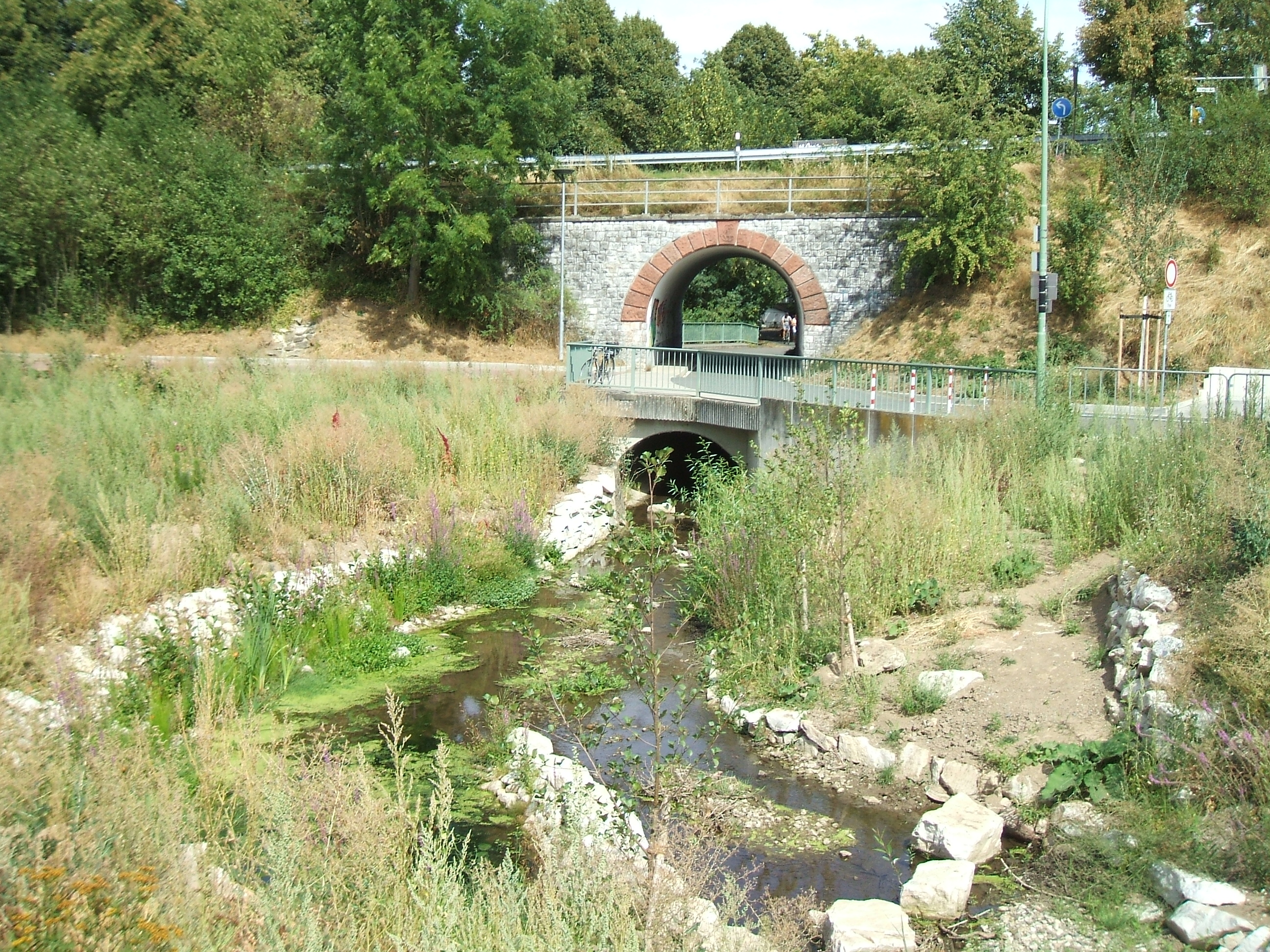 Der Seebach unter der Kreisstraße 13 nach Bad Nauheim wird in einem eigens errichteten Tunnel für den Rad- und Fußweg darüber durchgeleitet, links versteckt sich der RÜ